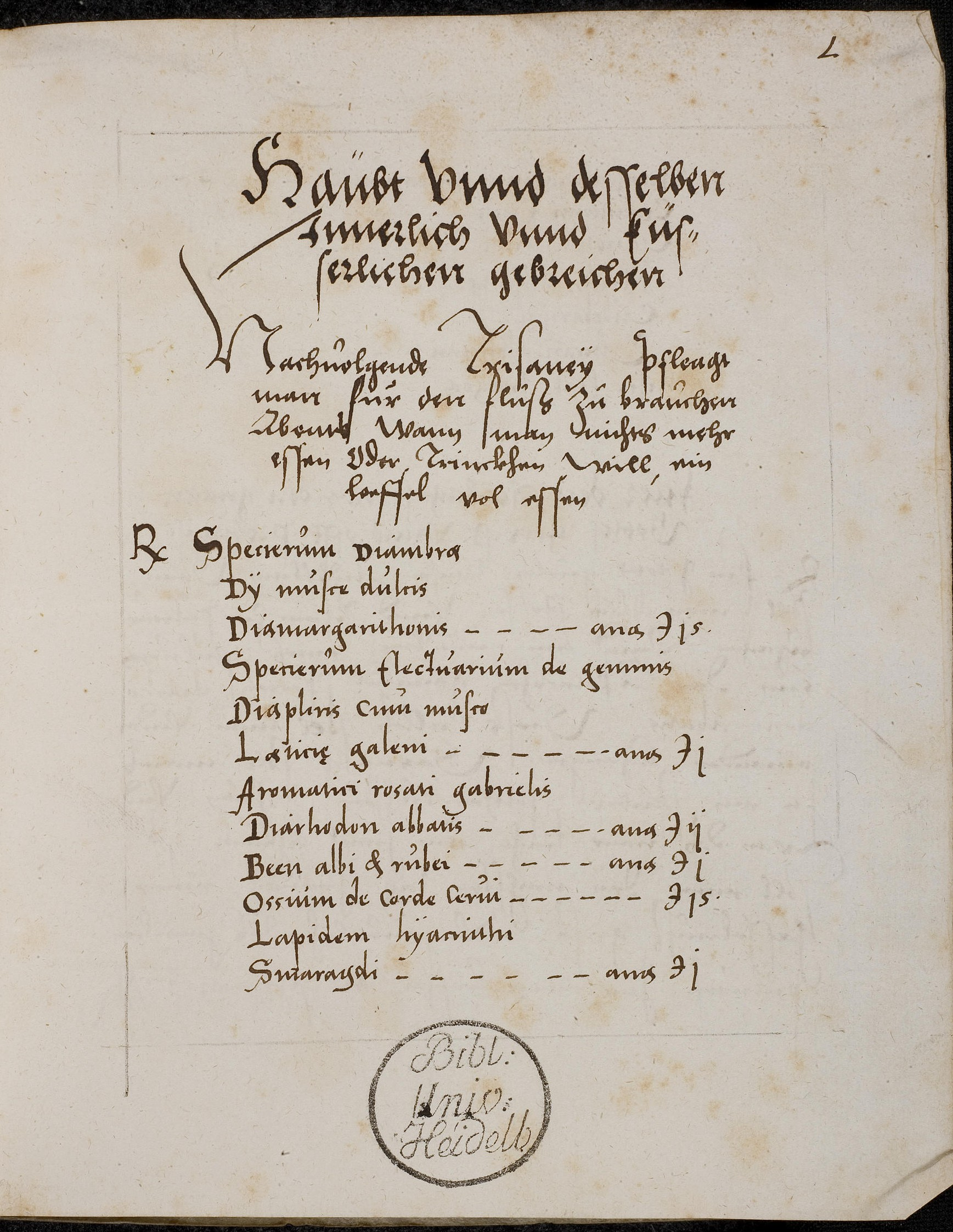 Codex Palatinus germanicus 500, "Gräfin Juliana von Nassau-Dillenburg (?): Medizinische Rezeptsammlung", Blatt 1r der Handschrift.